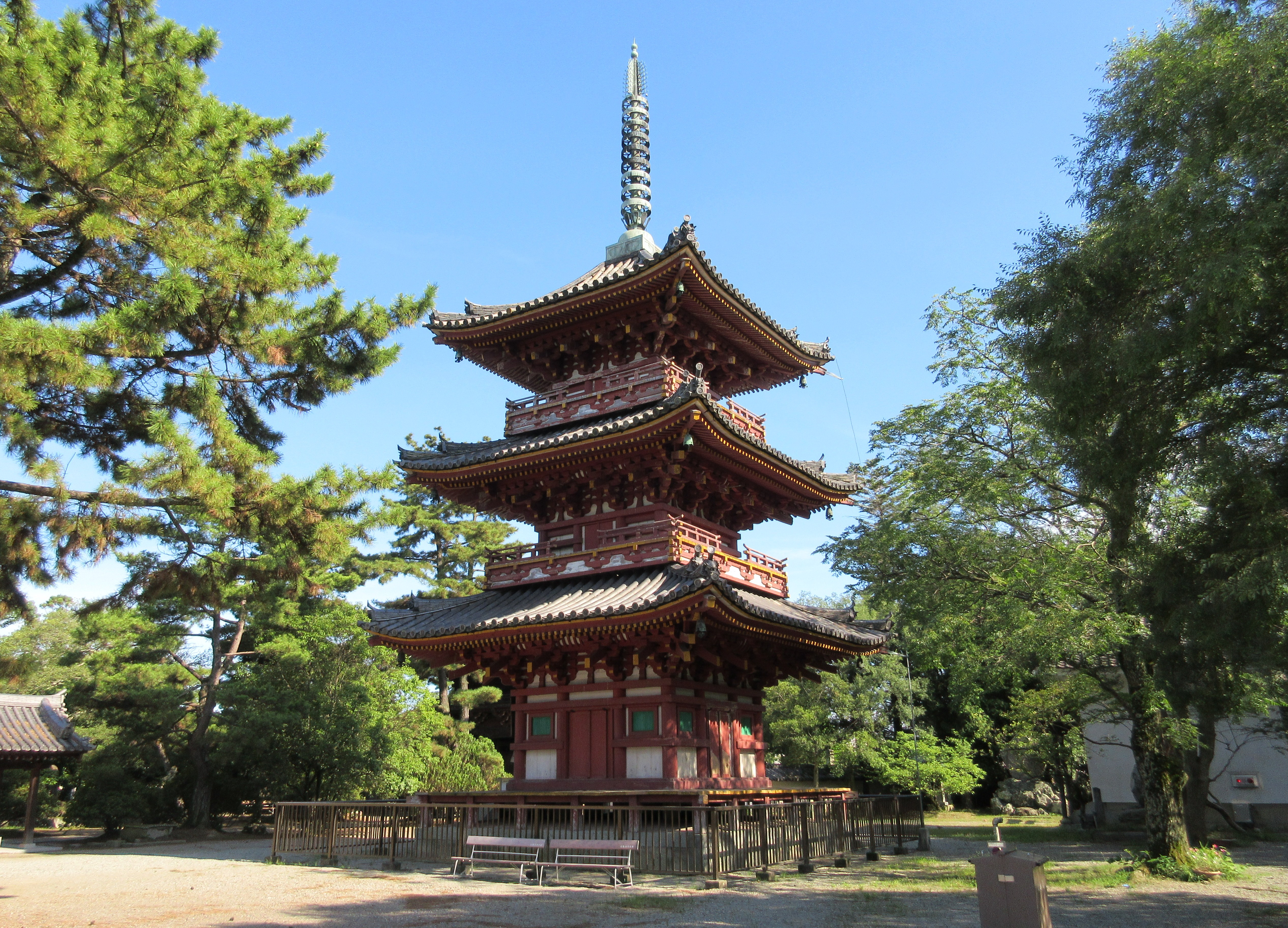 鶴林寺三重塔